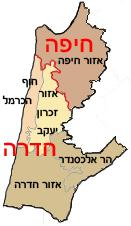 מחוז חיפה, מחולק לנפות